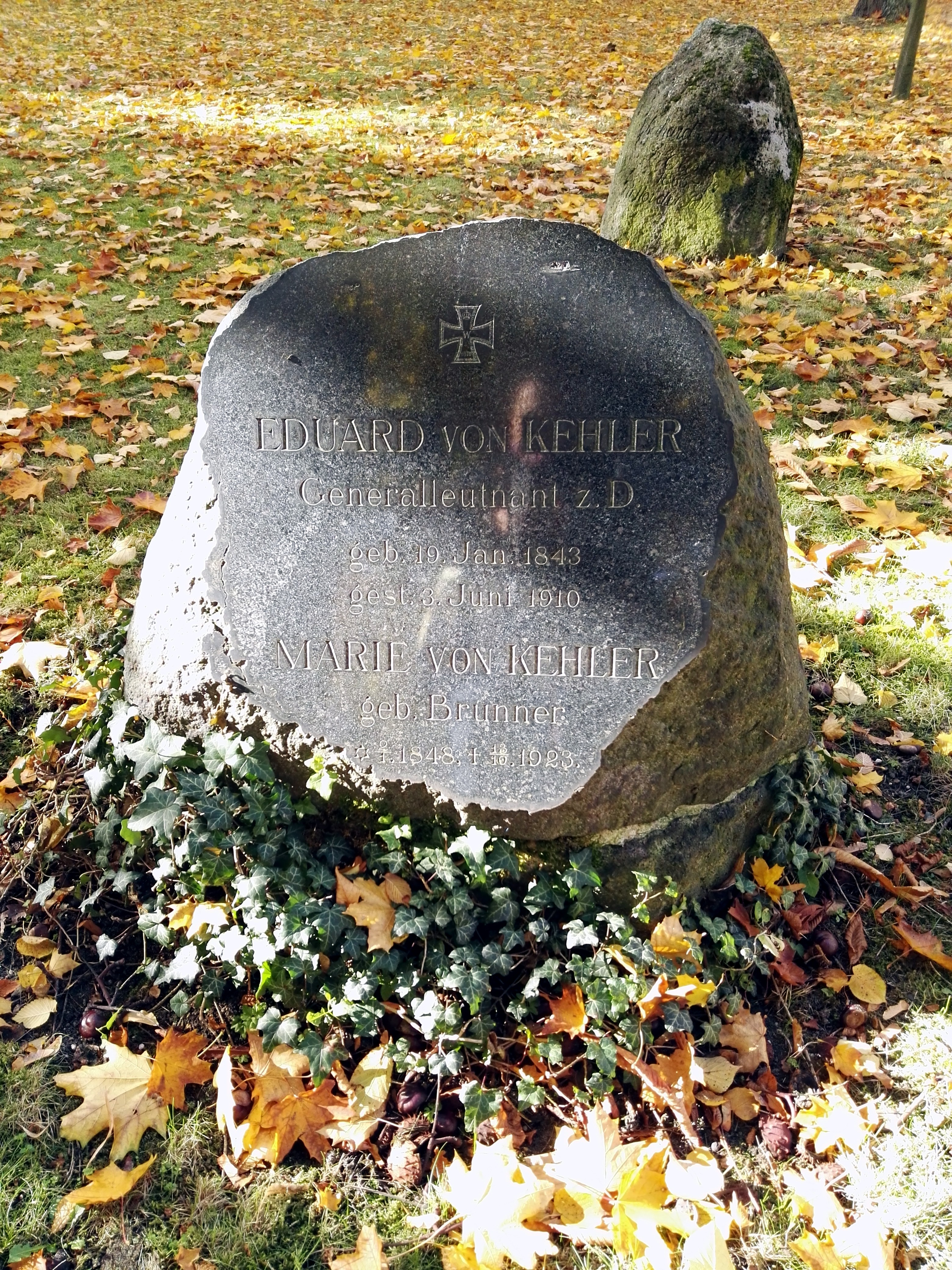 Grab von Eduard von Kehler auf dem Alten Garnisonfriedhof in Berlin-Mitte